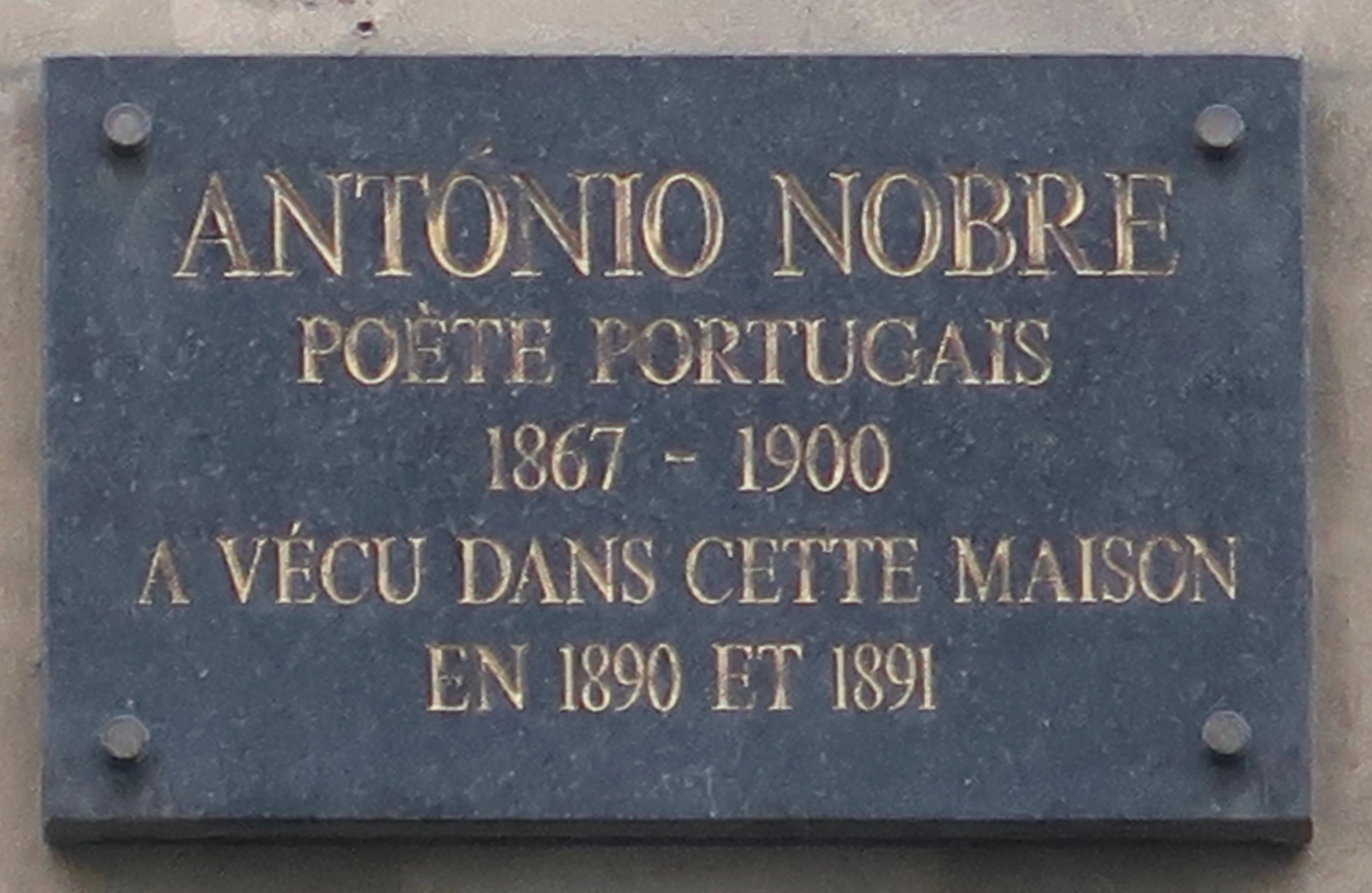 Plaque en hommage au poète portugais Antonio Nobre, au 12 rue de la Sorbonne (Paris, 5e), où il vécut de 1890 à 1891.